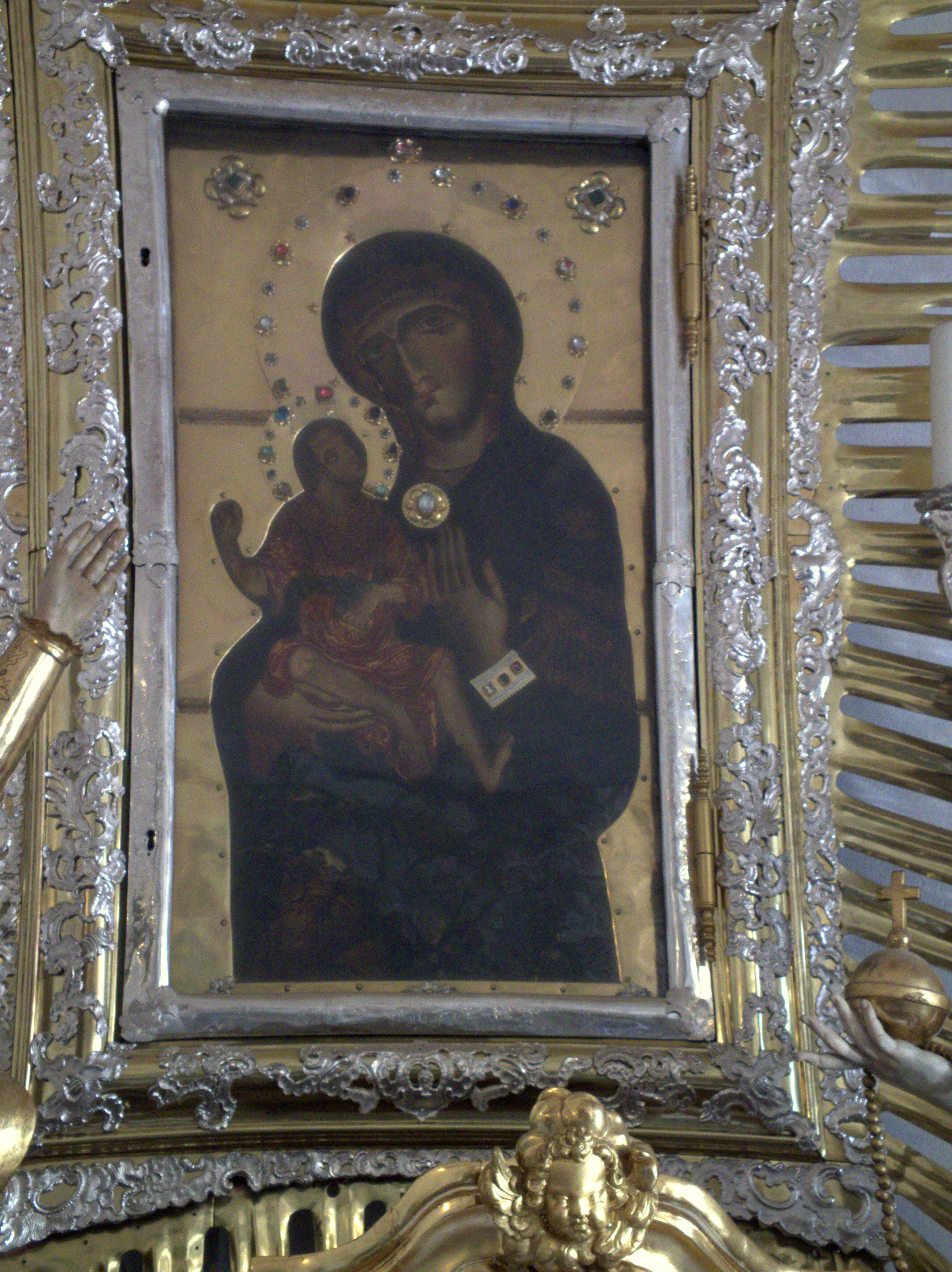 Alte Kapelle Regensburg - Gnadenkapelle: Gnadenbild